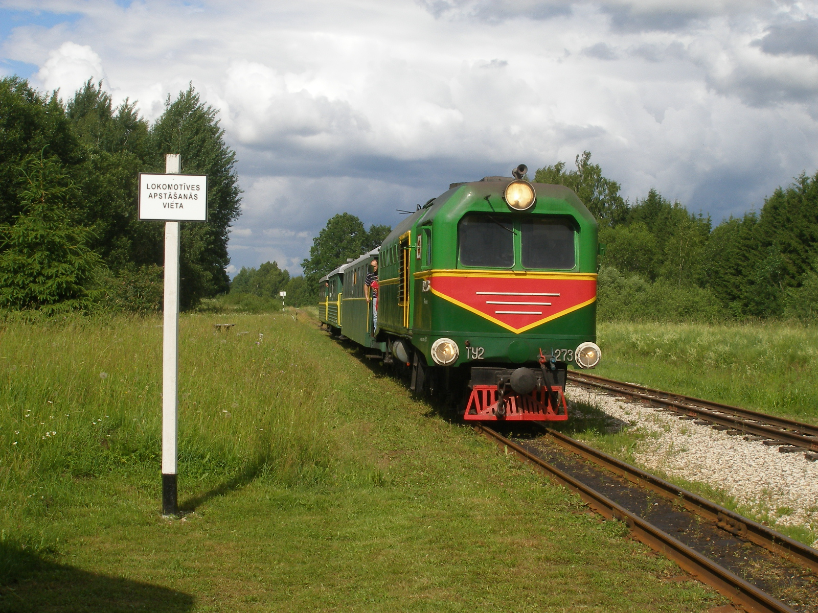 Pasažieru vilciens ar lokomotīvi TU-2 pienāk Kalnienas stacijā